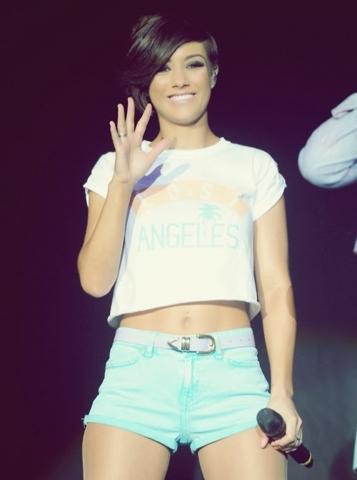 Frankie